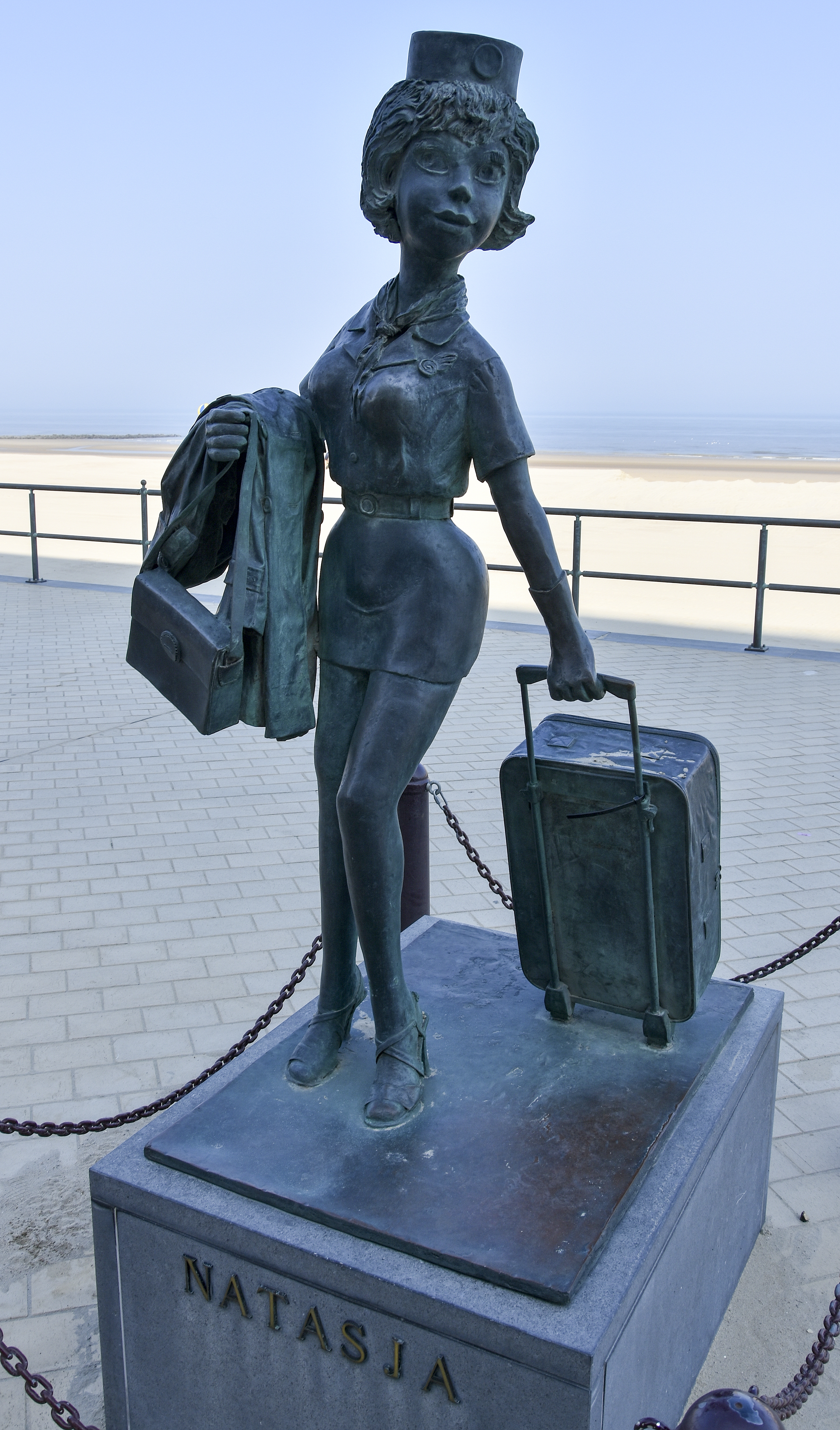 Jan Maillard - Nero - Stripstandbeelden Middelkerke